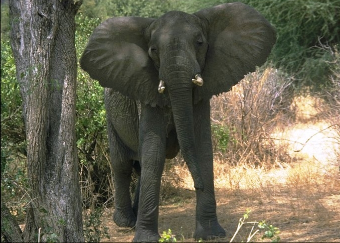 Elephant - Lake Manyara National Park - Tanzania - 1996